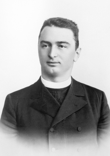 Franz Prisching (1866 - 1935), Rakouský římskokatolický kněz a politik.